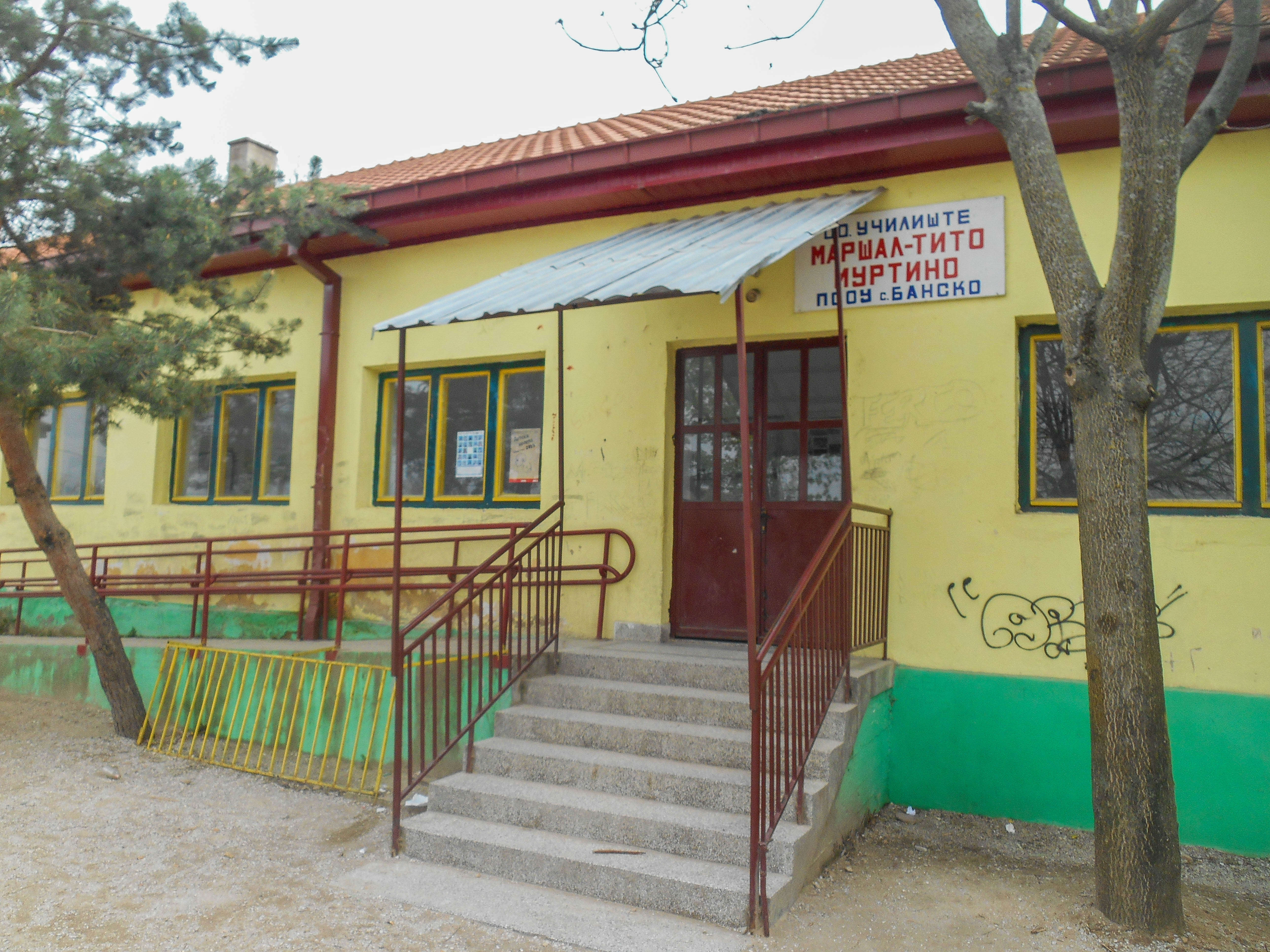 Подрачно основно училиште Маршал Тито